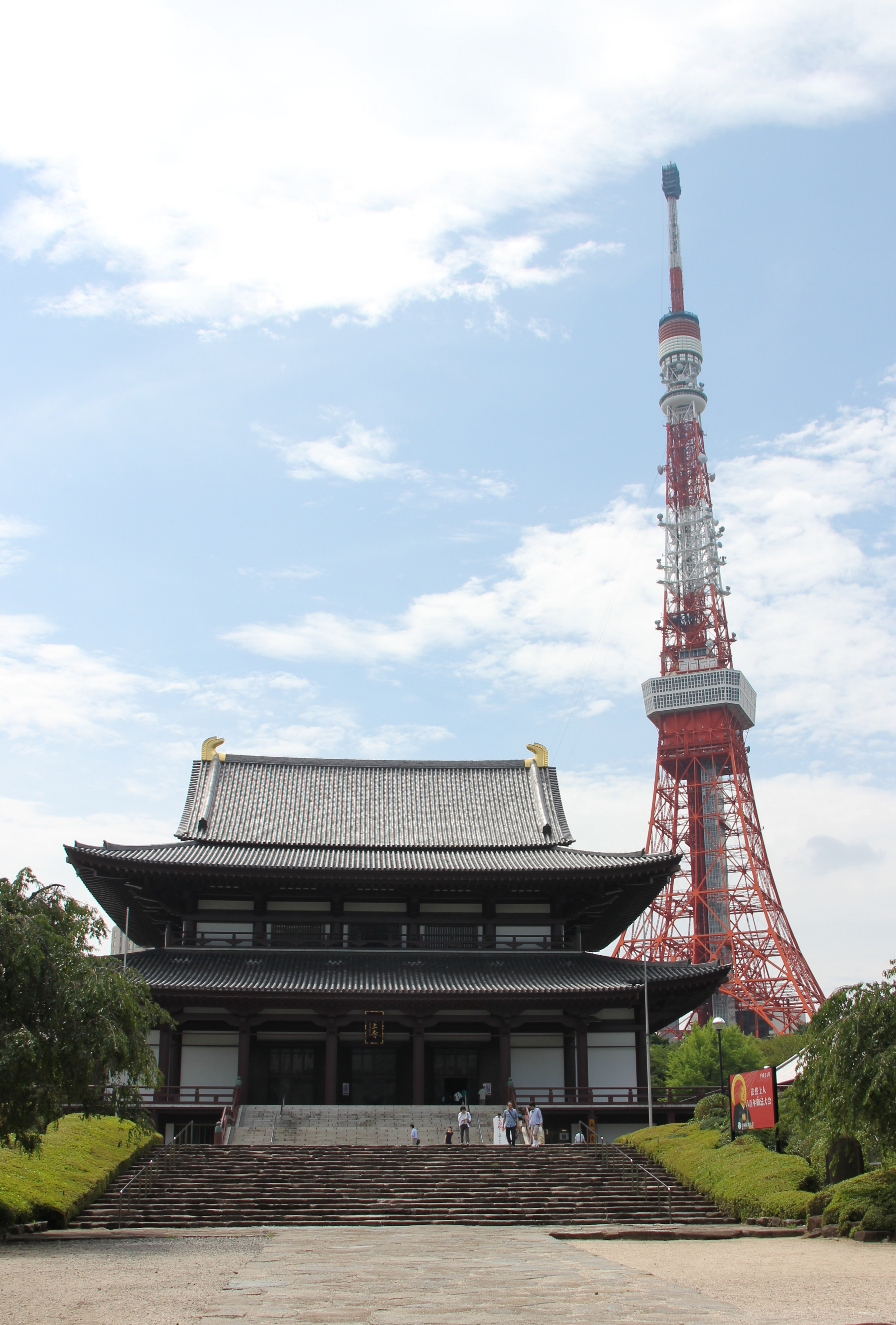 Zōjō-ji Temple